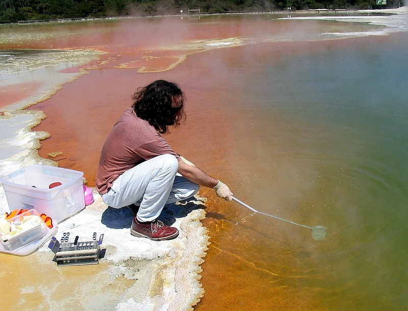 Entnahme von Wasserproben aus „Champagne Pool“. author: Adrian Hetzer